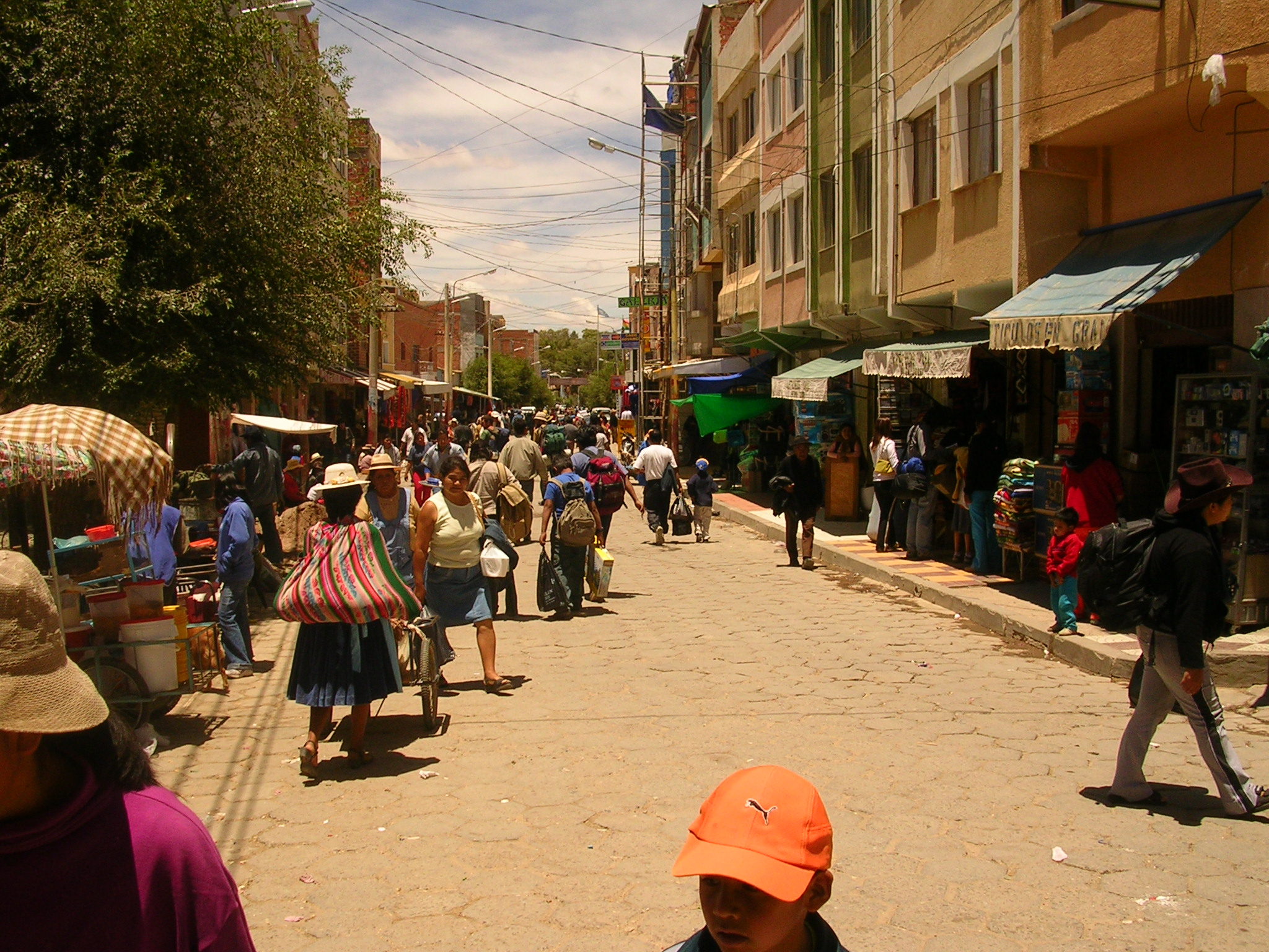 Calle de Villazón (Bolivia)